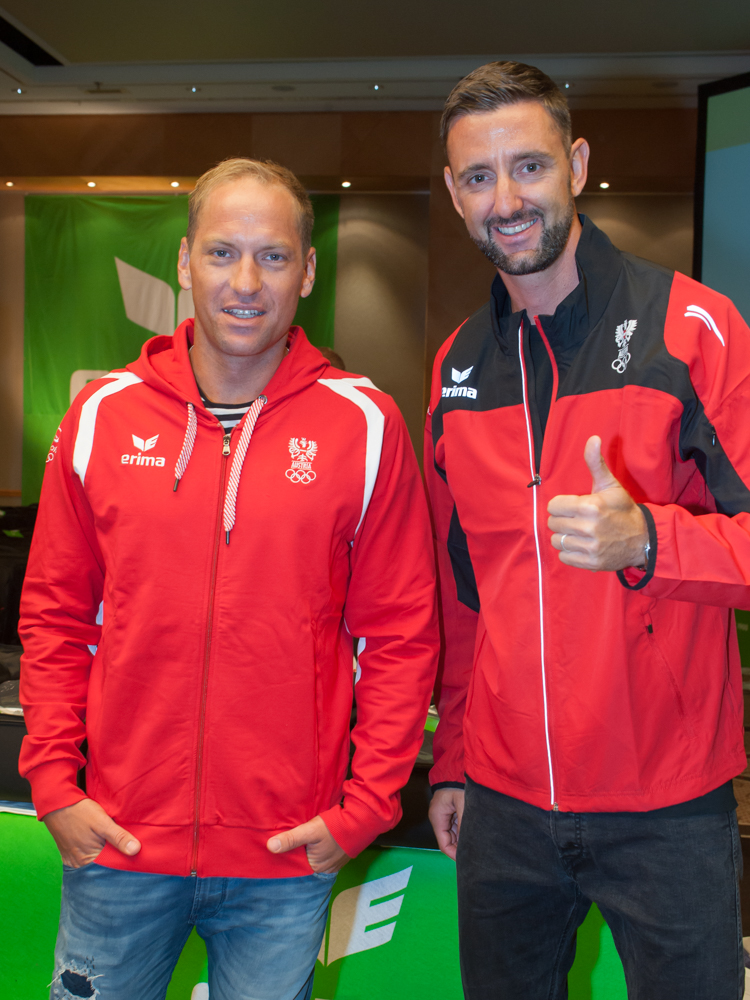 Einkleidung der Österreichischen Teilnehmer an den Olympischen Sommerspielen 2016 am 16./17. Juli 2016 in Wien. Bild zeigt Alexander Horst und Clemens Doppler.